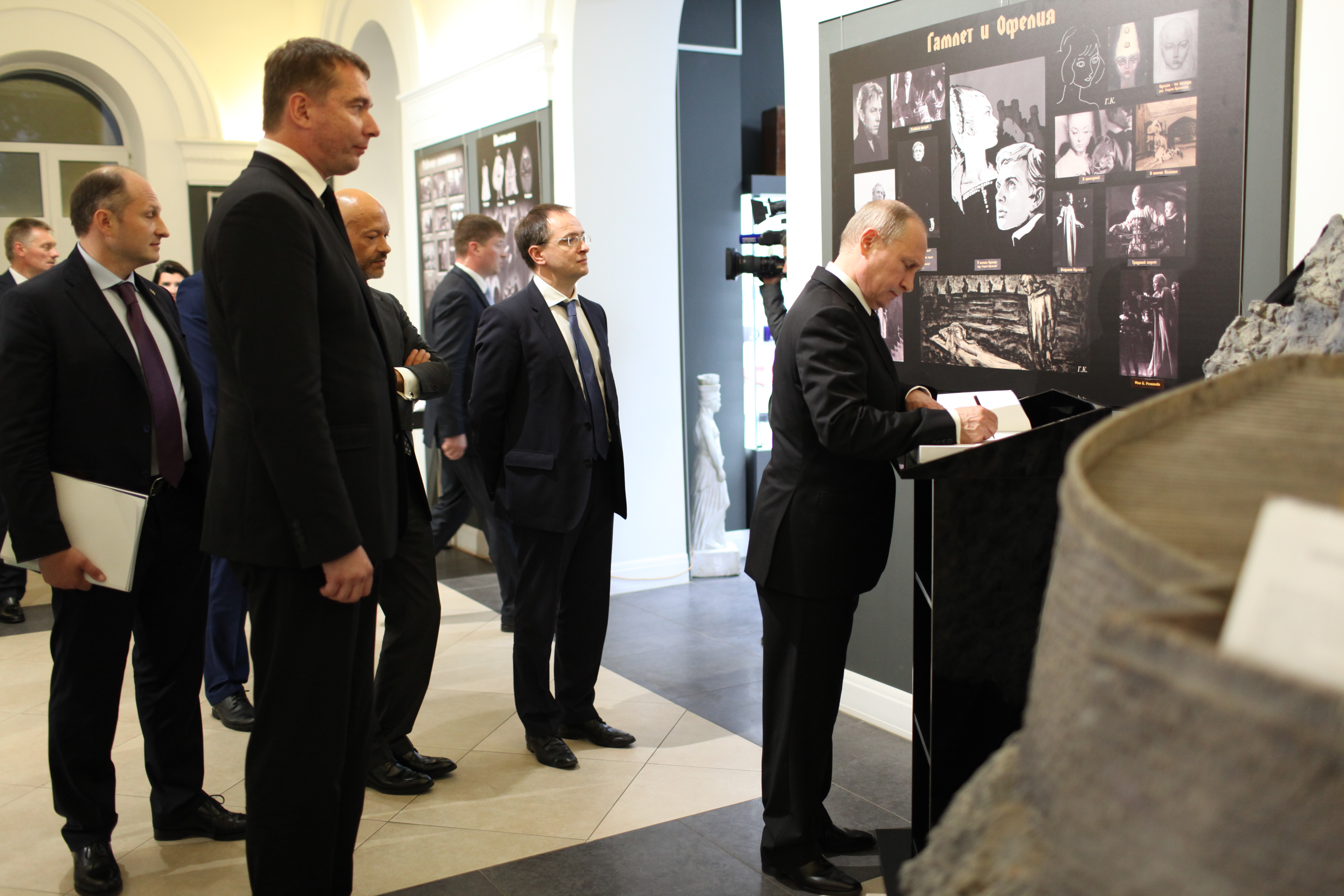 Владимир Путин оставил запись в Книге почётных гостей «Ленфильма»